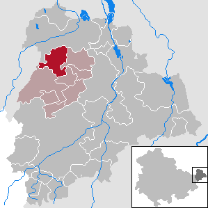 Kriebitzsch in Thuringia - District Altenburger Land